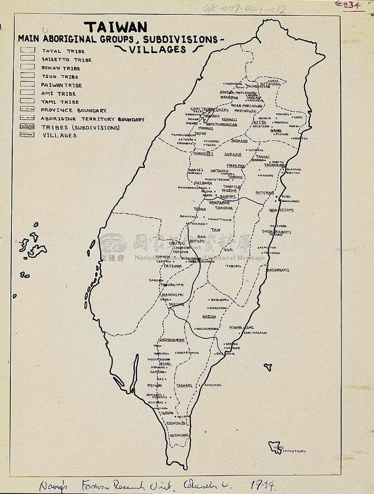 中文（台灣）: 本地圖共標記出約 120餘筆有關臺灣島上之原住民部落空間分布情形，共計包括有泰雅族(TAYAL TRIBE)、賽夏(SAISETTOTRIBE)、布農(BUNAN TRIBE)、曹族(TSUO TRIBE)、排灣族(PAIWANTRIBE)、阿美族(AMI TRIBE)、雅美族(YAMI TRIBE)等7大種原住民的生活空間地域範圍(ABORIGINE TERRLTORY BOUNDARY)、與部落之空間分布情形。地圖框下側有此地圖收藏者，當時美國在台副領事館葛超智之原子筆手寫註記。